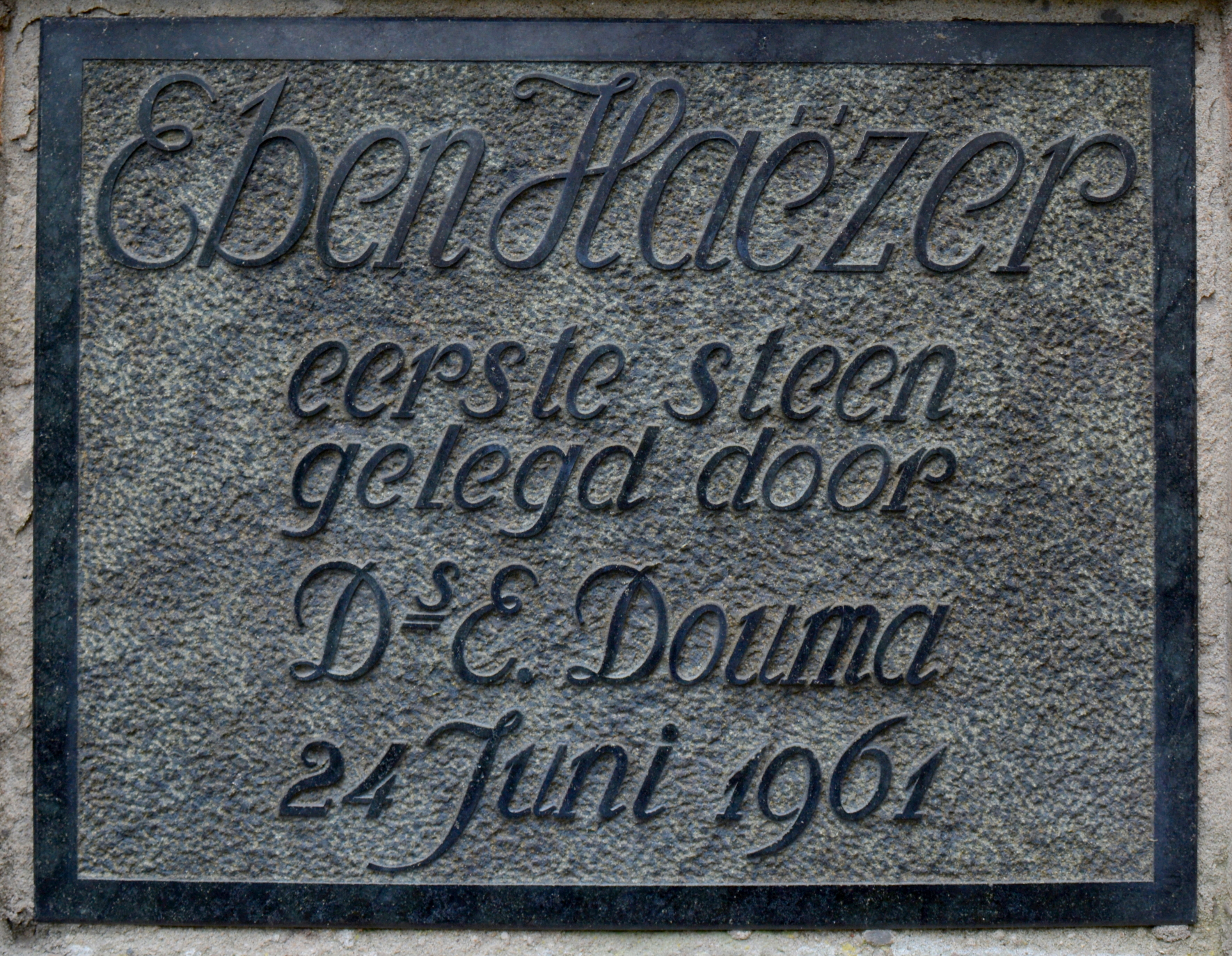 Ureterp, geref. kerk de Ontmoeting, herdenkingssteen